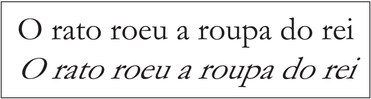 Diferenças entre o romano e o oblíquo (inclinação forçada) do tipo garamond